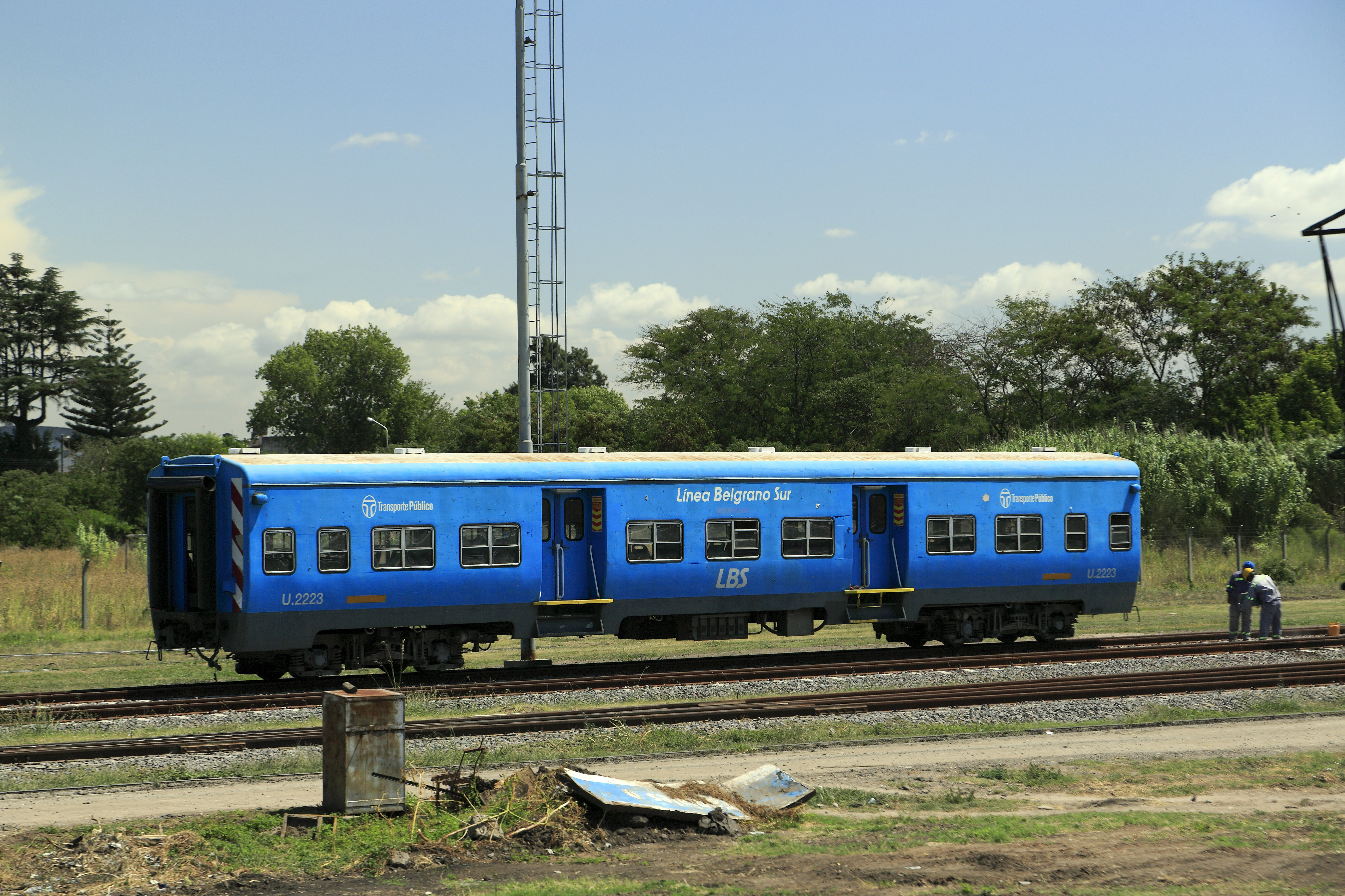 Mitteleinstiegwagen der Línea Belgrano Sur, die unten eingezogene Kastenform mit relativ kleinen Fenstern ist eine typisch südamerikanische Bauart in britischer Tradition. Für die Umstellung au stufenlose Einstiege wurden die Trittkästen abgedeckt, aber nicht ausgebaut.